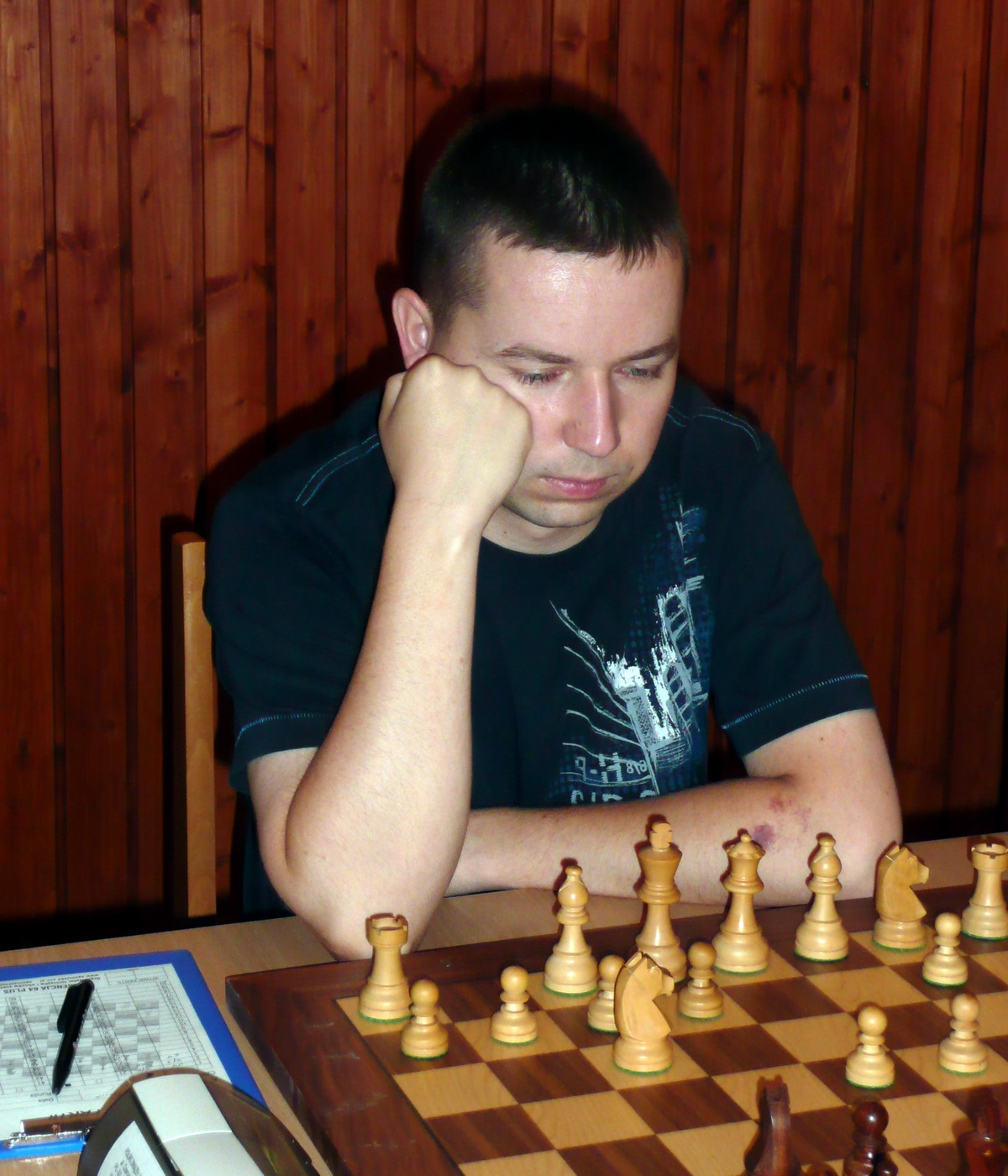 GM Robert Kempiński, Karpacz 2008